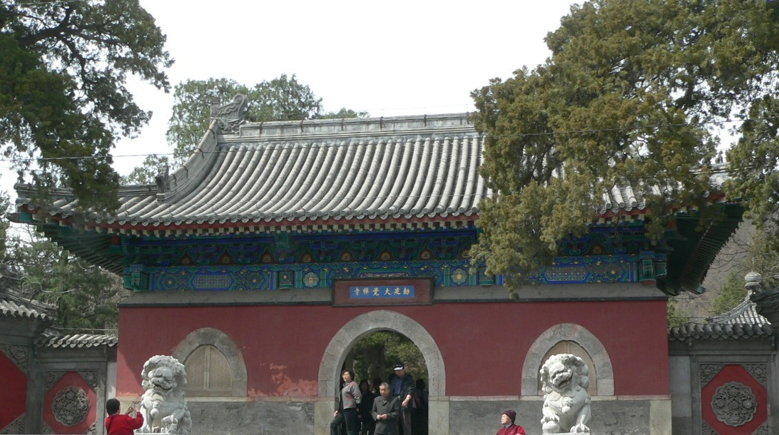 大觉寺山门，用心阁2005年4月10日拍摄于西山大觉寺。